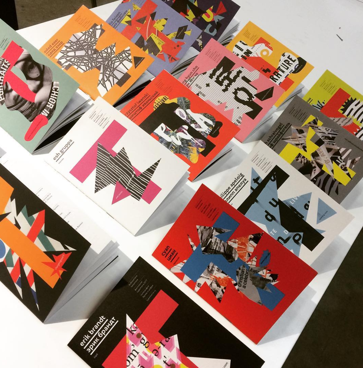 Библиотека типомана (2017) — серия книжек о дизайнерах, героях фестиваля Typomania